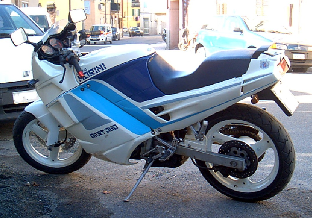 Vista di una Moto Morini Dart 350 1989 Foto scattata da me alla mia moto